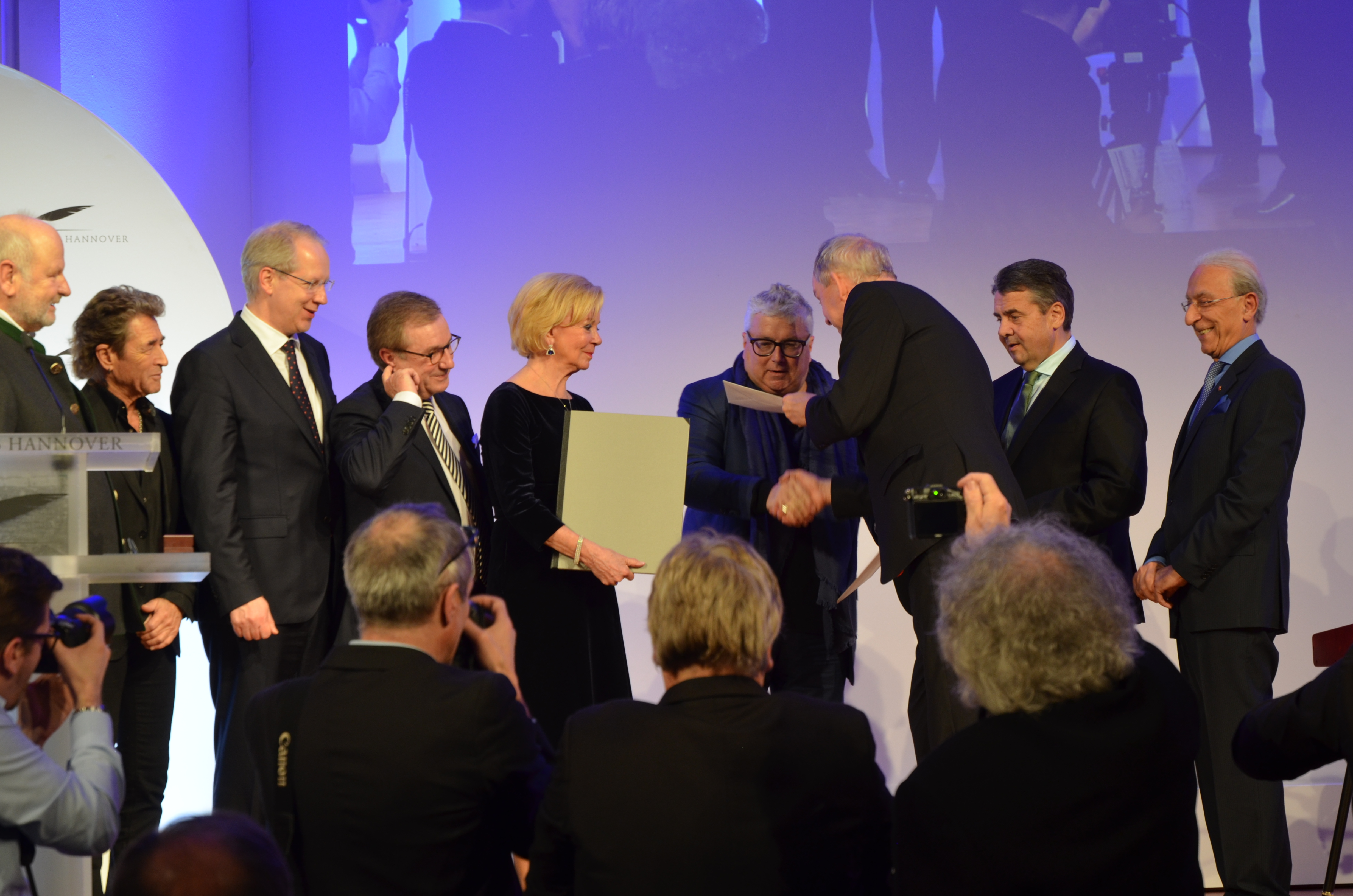 Auf der Bühne vom Leibniz-Saal im Hannover Congress Centrum (HCC) erhielt der mit dem LeibnizRingHannover 2017 ausgezeichnete Unternehmer und Professor Hans Georg Näder nach der Urkunde auch den mit dem Preis verbundenen Scheck in Höhe von Euro 15.000,- überreicht (oberere Reihe von links): Der Vorsitzende des Presse Club Hannover Jürgen Köster, der Sänger Peter Maffay, der Oberbürgermeister der Landeshauptstadt Hannover Stefan Schostok, der Tagesschau-Sprecher Jan Hofer, die Unternehmerin, Bertelsmann-Aufsichtsrätin und Vorsitzende des Kuratoriums LeibnizRingHannover Liz Mohn, der geehrte Hans Georg Näder, der NDR-Intendant Lutz Marmor (bei der Briefübergabe), der geschäftsführende Bundesaußenminister Sigmar Gabriel und der Neurochirurg und Professor Madjid Samii. In der unteren Reihe ganz rechts der Fotograf Joachim Giesel ...